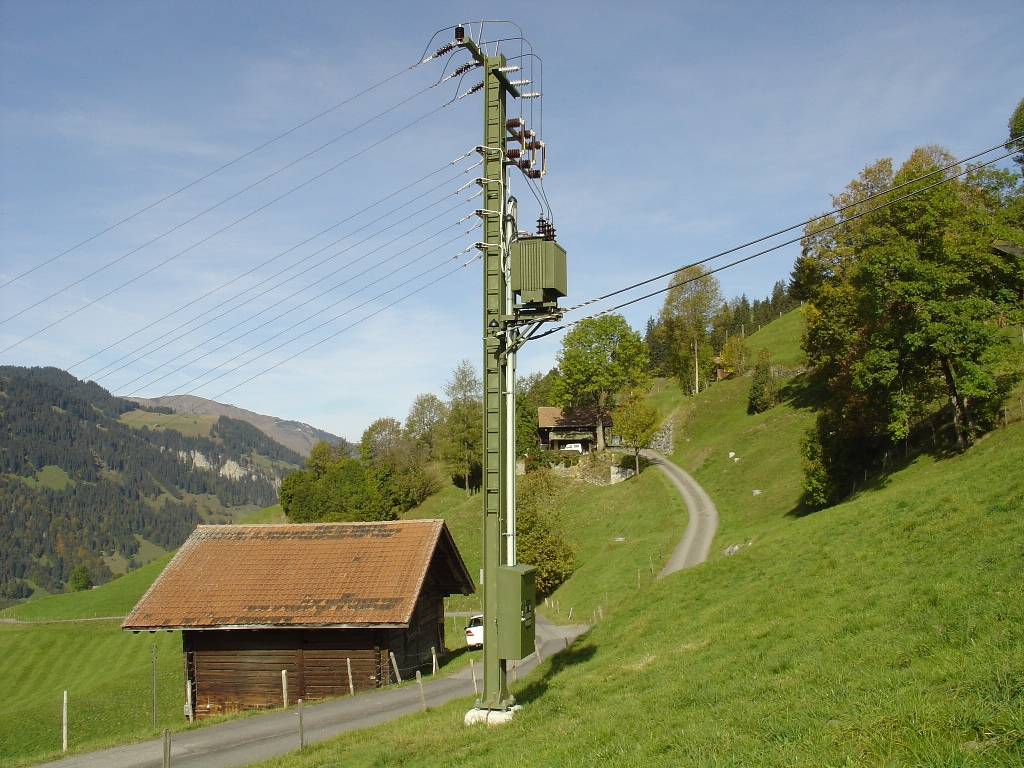 Eine HEB Hochspannungs Maststation mit Transformator und Niederspannungsabgänge